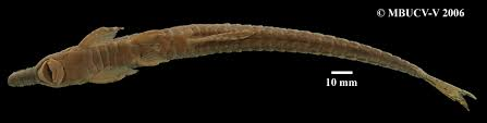 pez de territorio venezolano